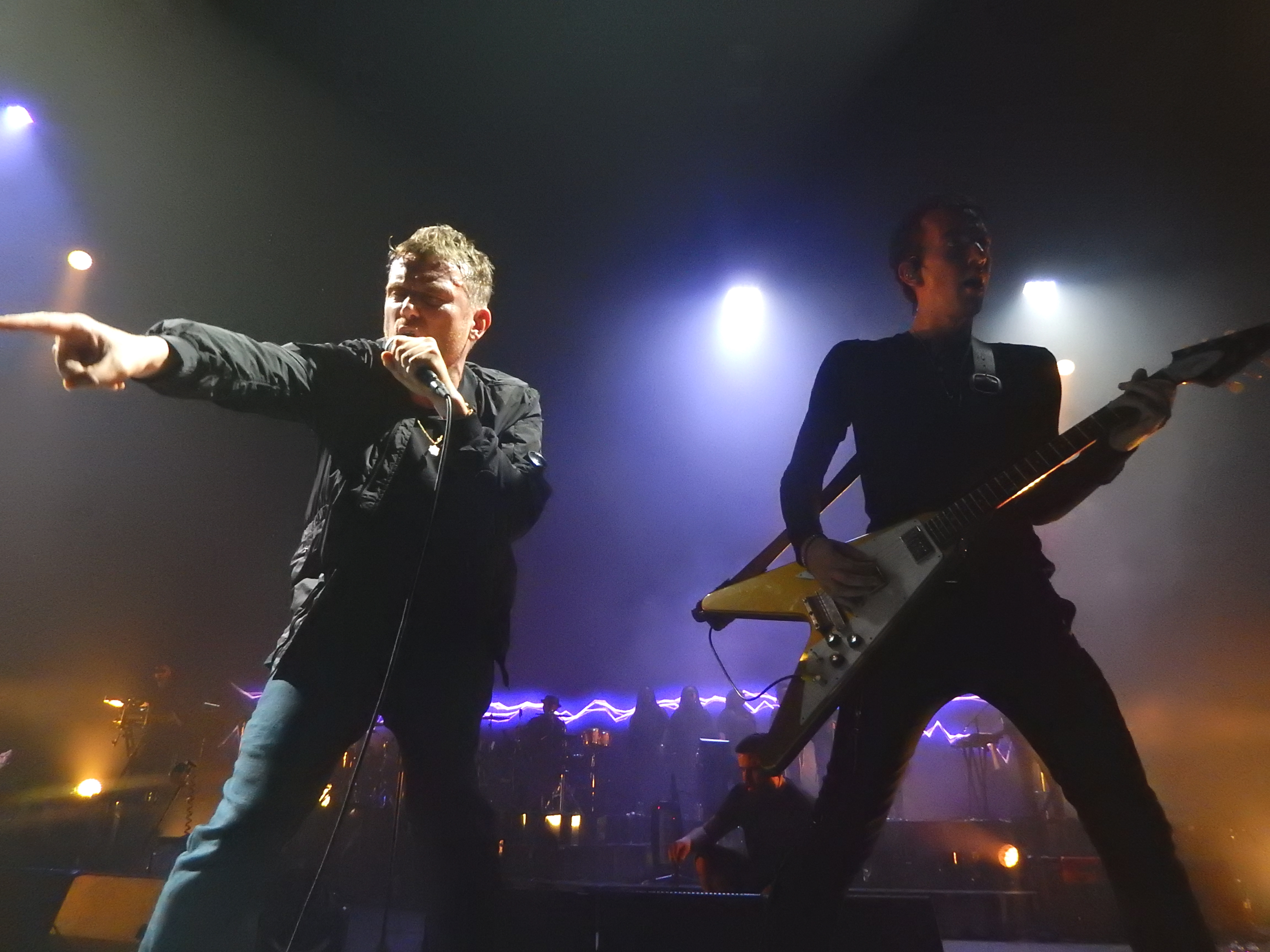 Gorillaz, Brixton Academy, London